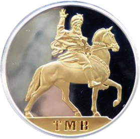 Памятная монета Туркменистана